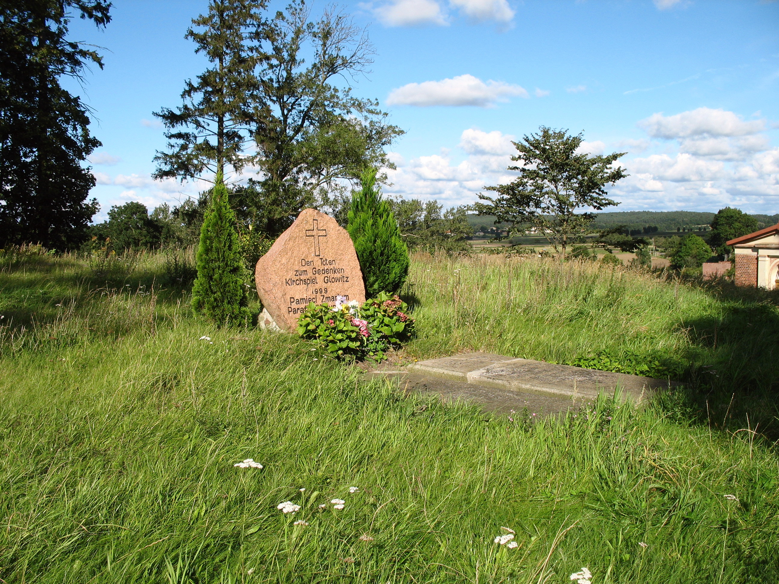 Główczyce (województwo pomorskie)